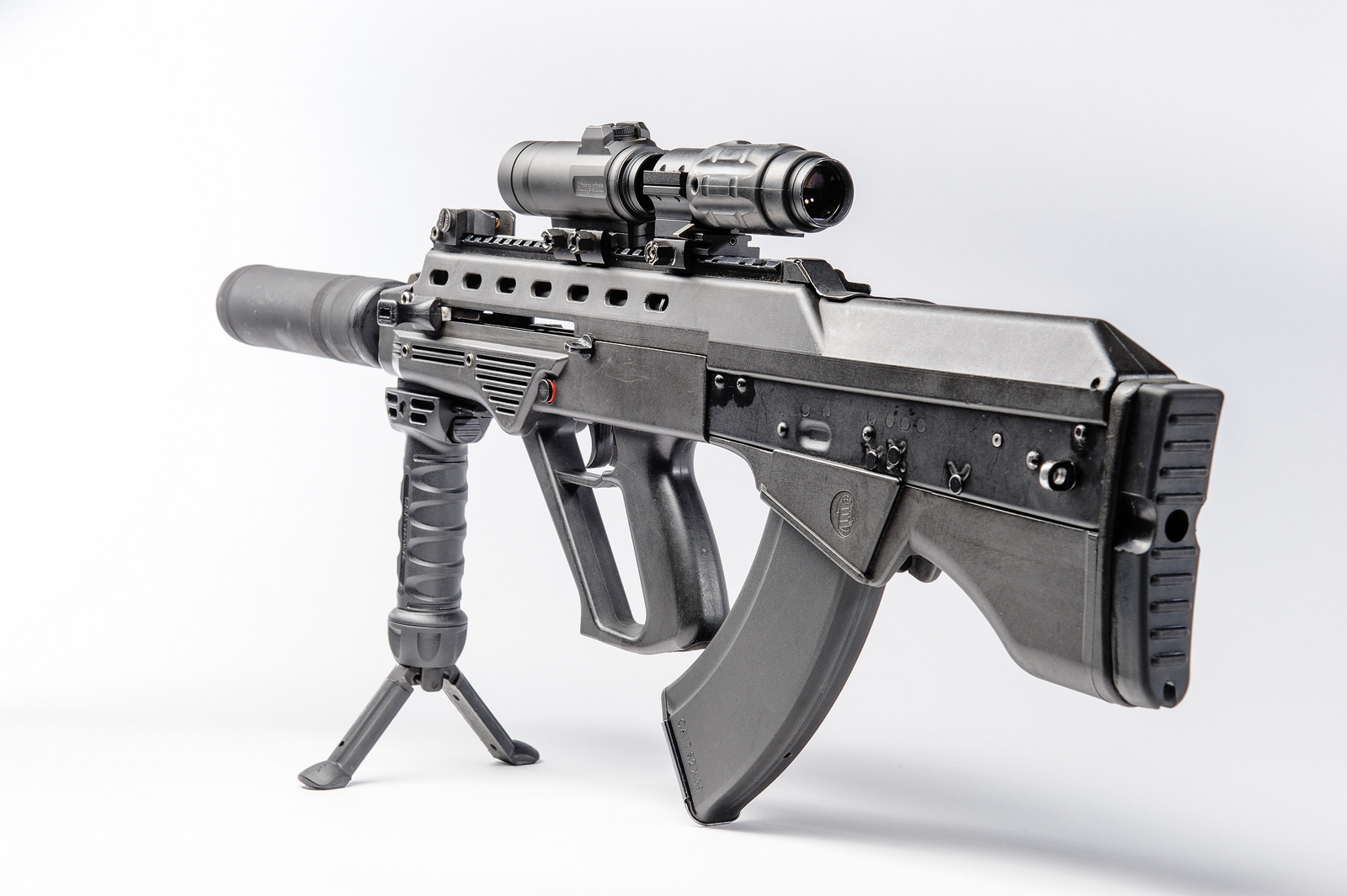 Прийнятий на озброєння спеціальний автомат «Вулкан», іще знаний як «Малюк», досить успішно зарекомендував себе саме в частинах та підрозділах спецпризначення й розвідки. Використовують його в морській піхоті й ДШВ. ТОВ «Інтерпроінвест» нинішнього року повністю виконало план оборонного держзамовлення на постачання цих автоматів до ЗСУ. «Вулкан» сконструйований за схемою «буллпап». Це коли спусковий гачок переміщений вперед та розташований перед магазином і ударно-спусковим механізмом. Під спусковим гачком – клавіша для викиду магазину. Надзвичайно вдало, трохи вище спускового гачка розміщено запобіжник, виконаний у вигляді кнопки. Він переводиться миттєво пальцем стрільця. Окрім того, автомат можна перезарядити, коли той стоїть на запобіжнику. Передбачено беззвучне приєднання магазину за натиснутої клавіші викиду. Автомат оснащено трьома планками Пікатінні. На них встановлюють оптичні й механічні пристрої, приціли, рукоятку, сошки і тактичний ліхтарик. Глушник на «Вулкані» досить швидко ставиться та знімається.